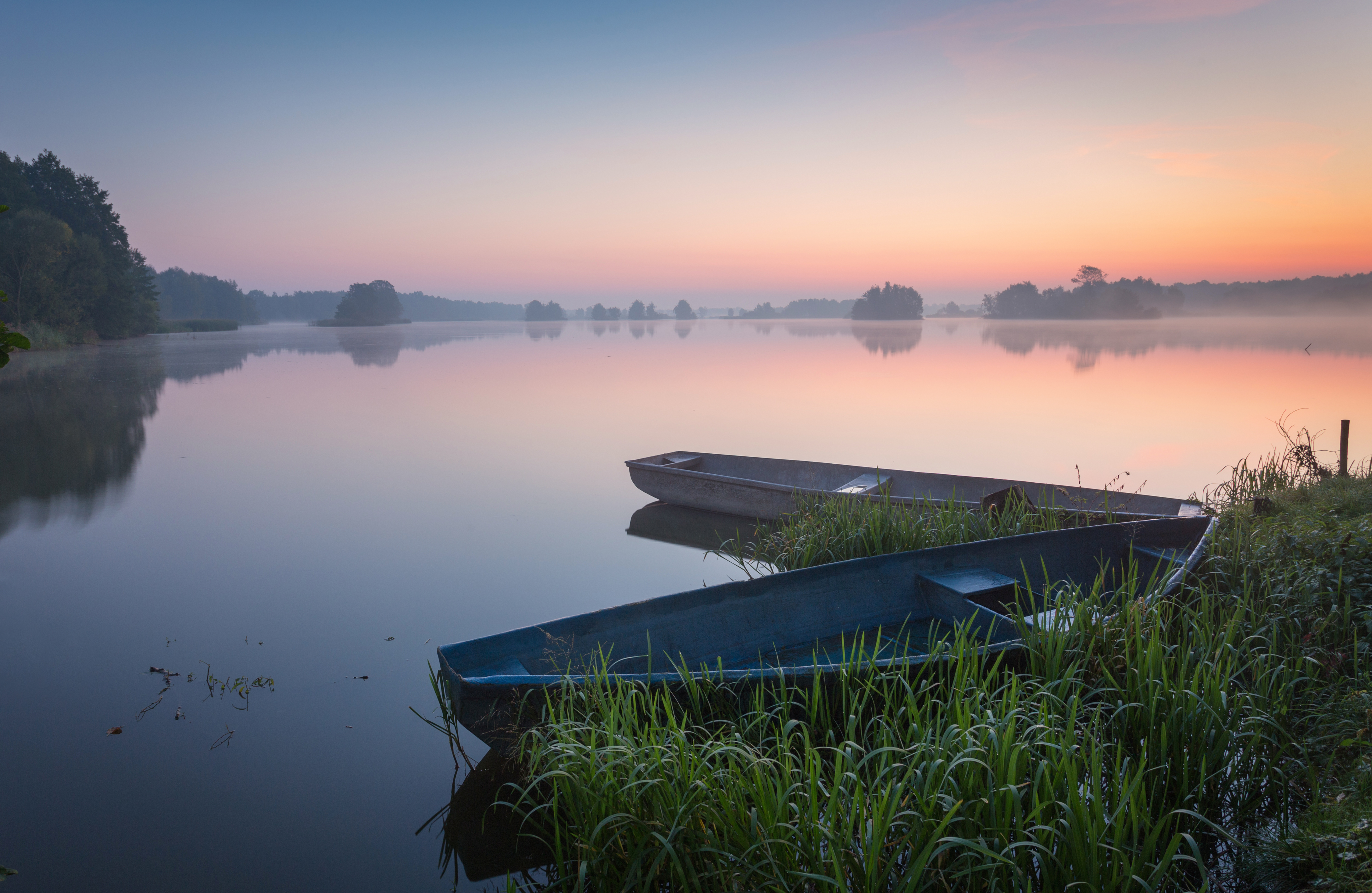 Rezerwat przyrody: Stawy Milickie. Staw Niezgoda This is a photography of protected area with CRFOP ID PL.ZIPOP.1393.RP.1109